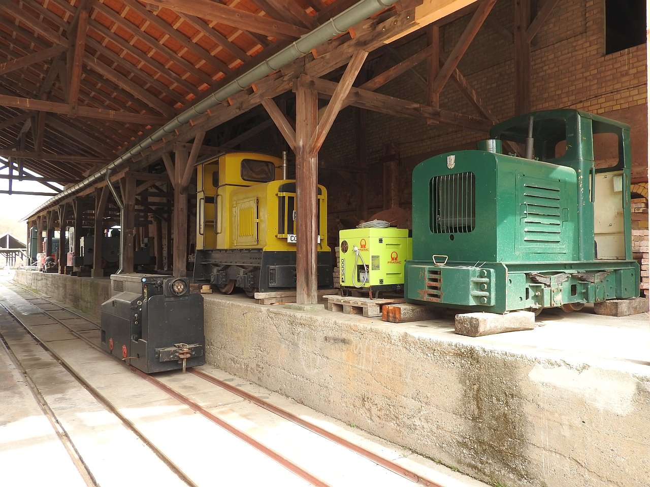 Ziegelei Sondernheim, 3.4.2016